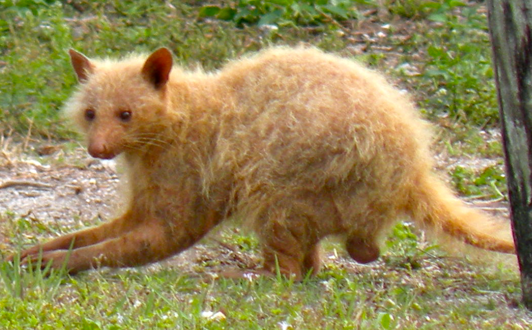 Ringe pris en photo a Virginia Key, FL